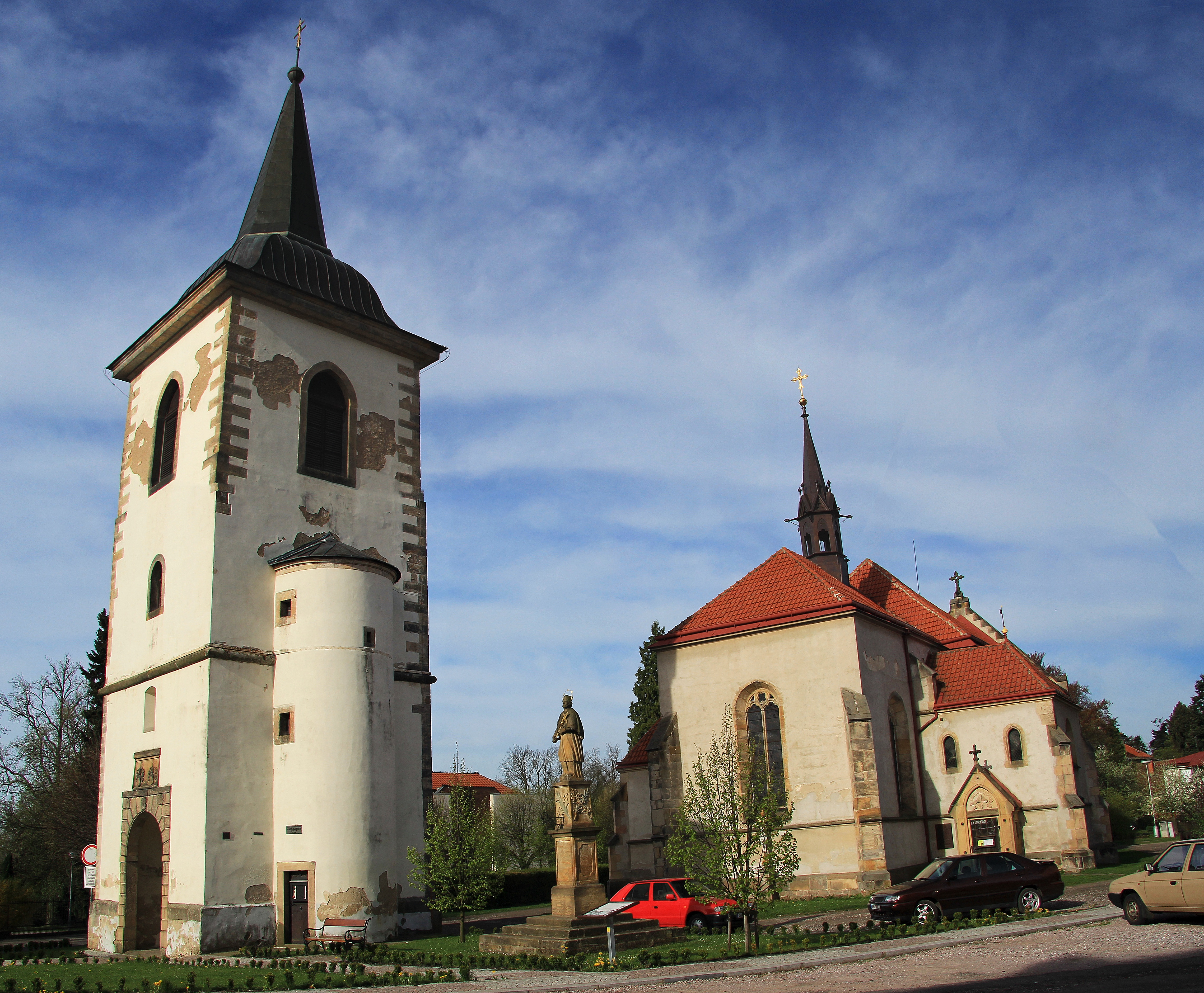 Zvonice a kostel Zvěstování P. Marie (Miletín), Miletín